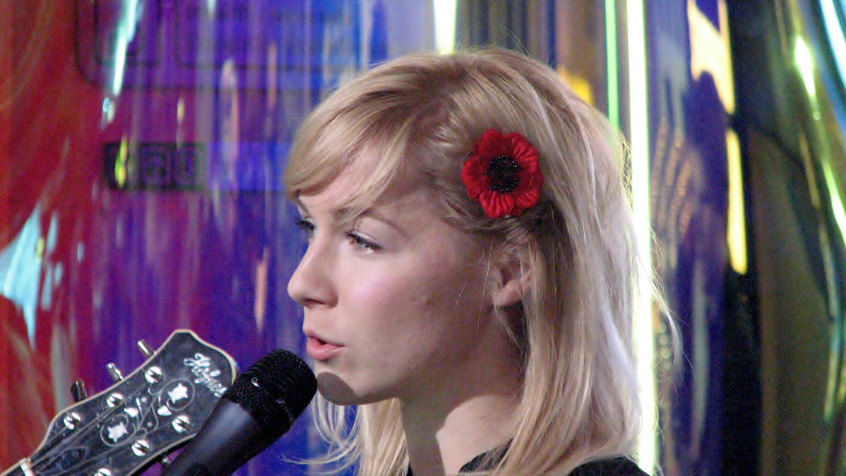 Lenna Kuurmaa Ringvaate Eesti Laulu salvestusel